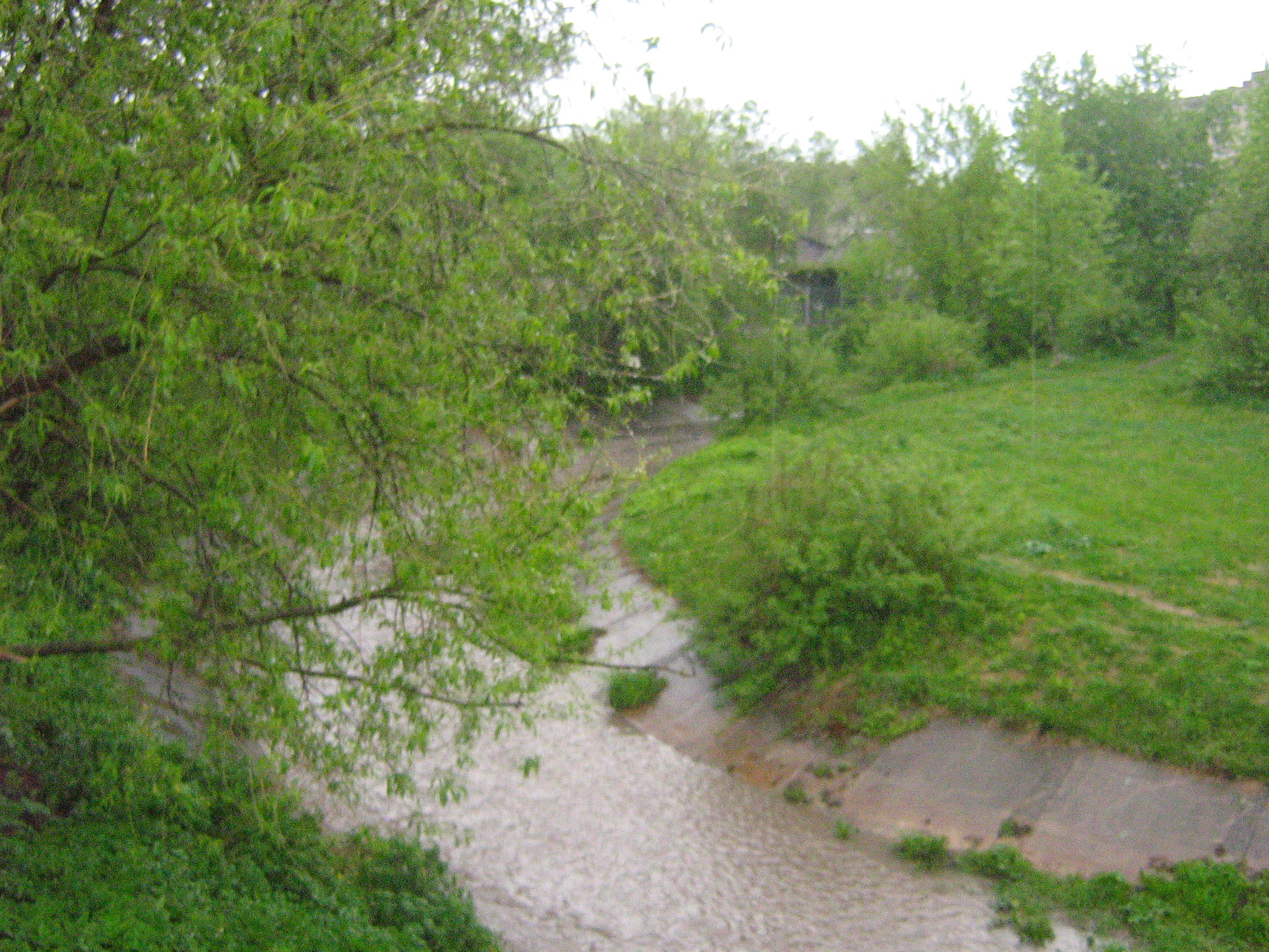 Varnutės upelis šalia Jonavos Senamiesčio gimnazijos